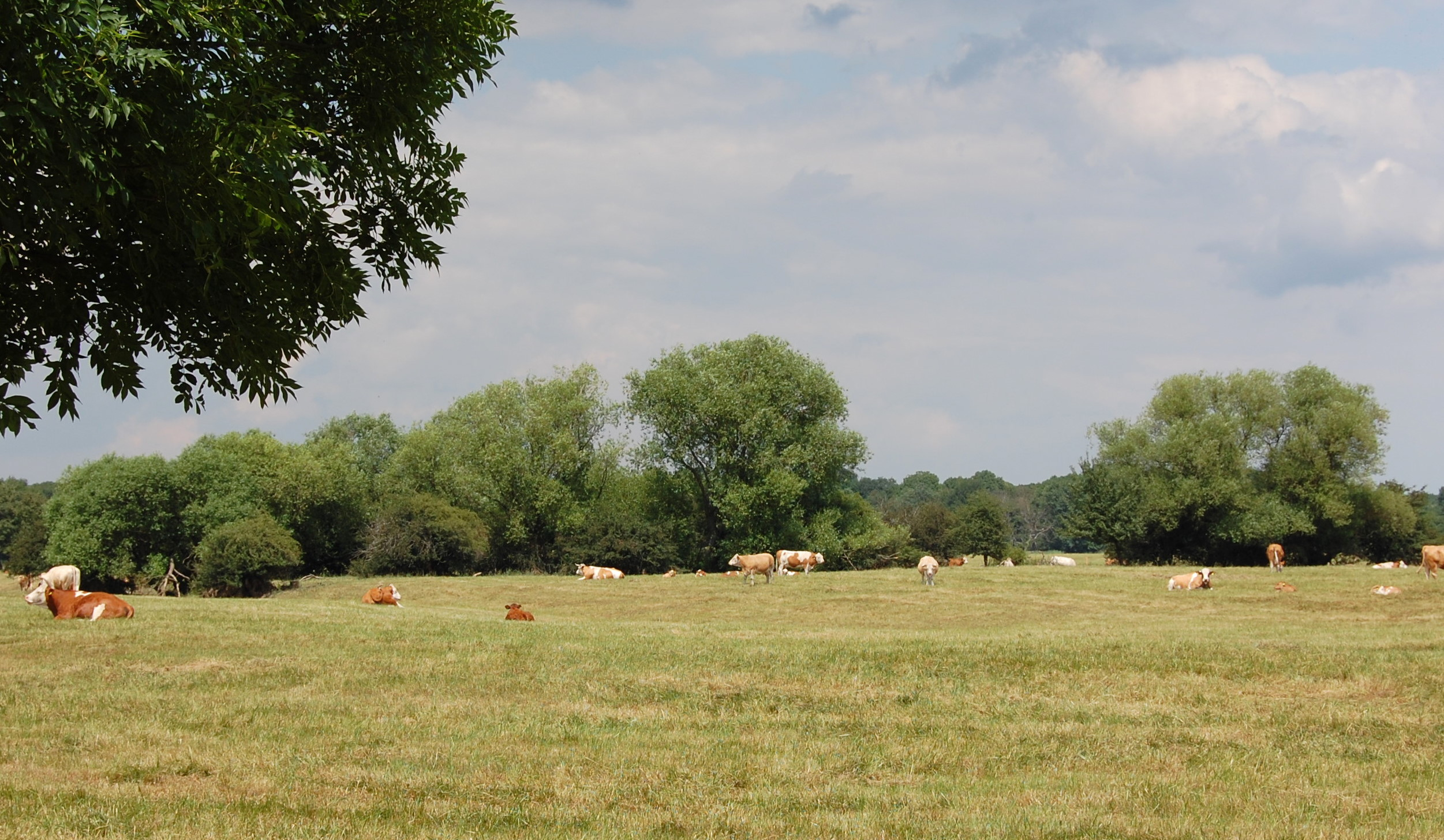 Blick von Westen auf die Jägerkulke, westlich der Fähre Westerhüsen